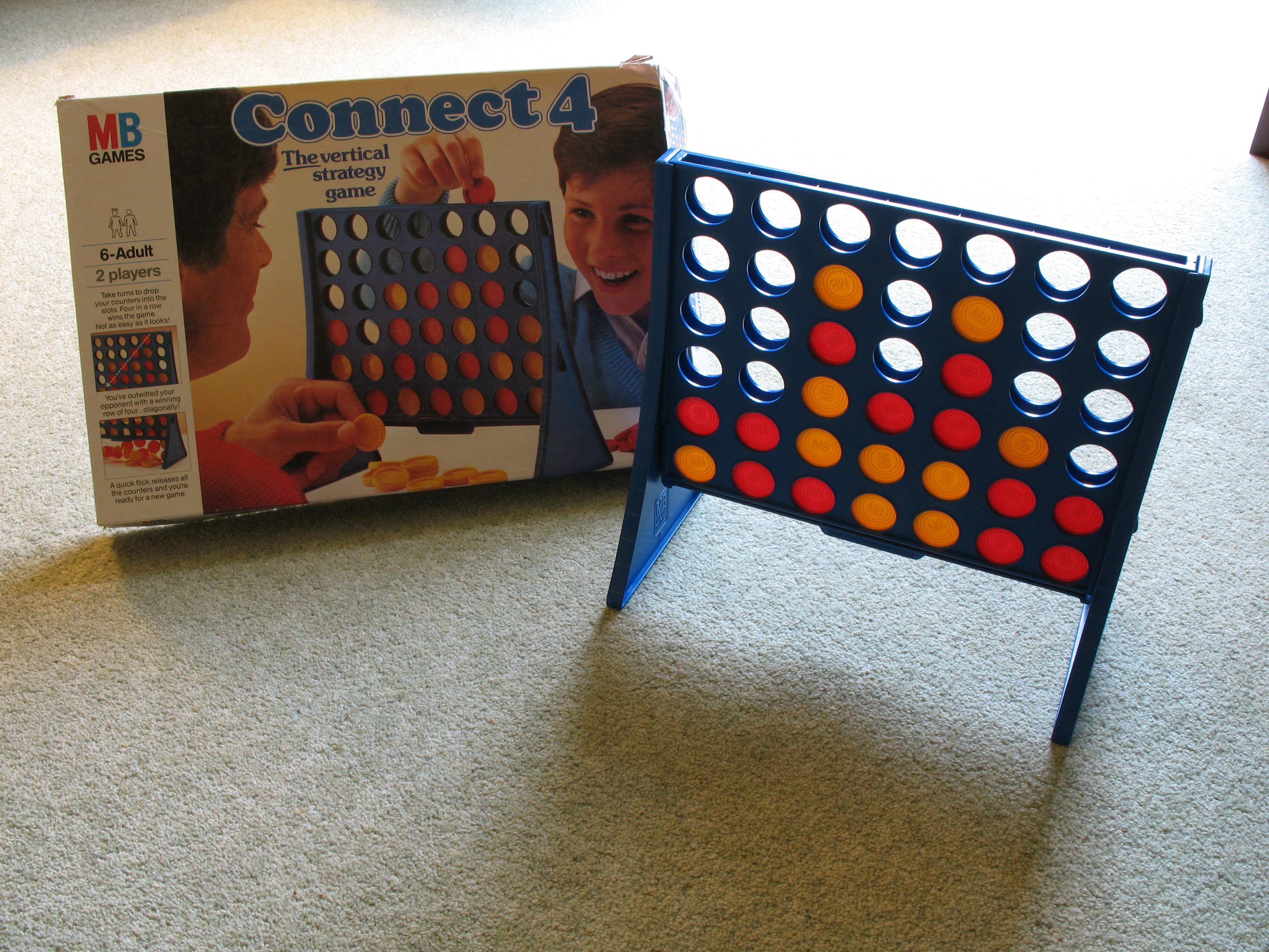 Connect 4